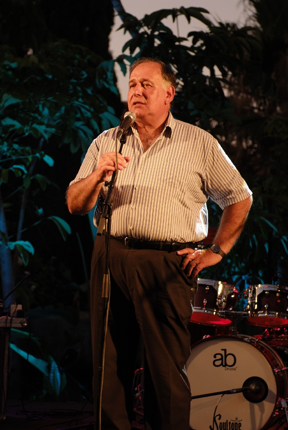 Wikimania 2011 in Haifa, Israel Yona Yahav, Mayor of Haifa / Bürgermeister von Haifa